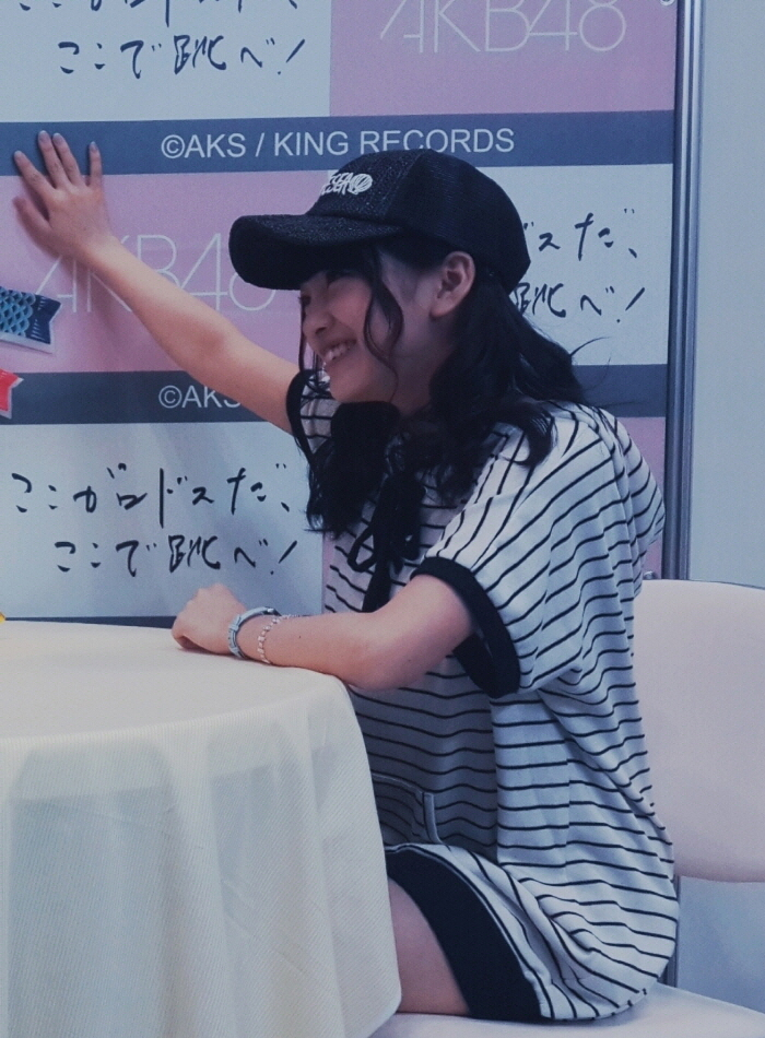 150505 『여기가 로도스다 여기서뛰어라!』샤메회 후기 (Mion Mukaichi)